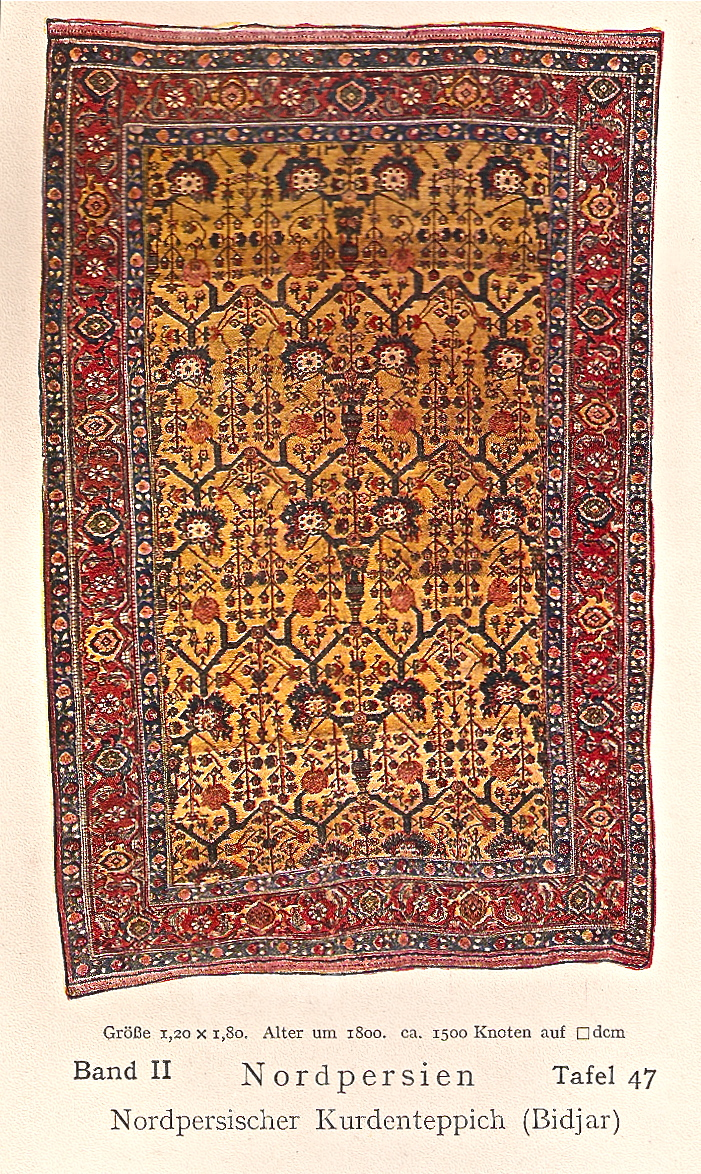 Bidjar afbeelding uit Der Orientteppich 1922